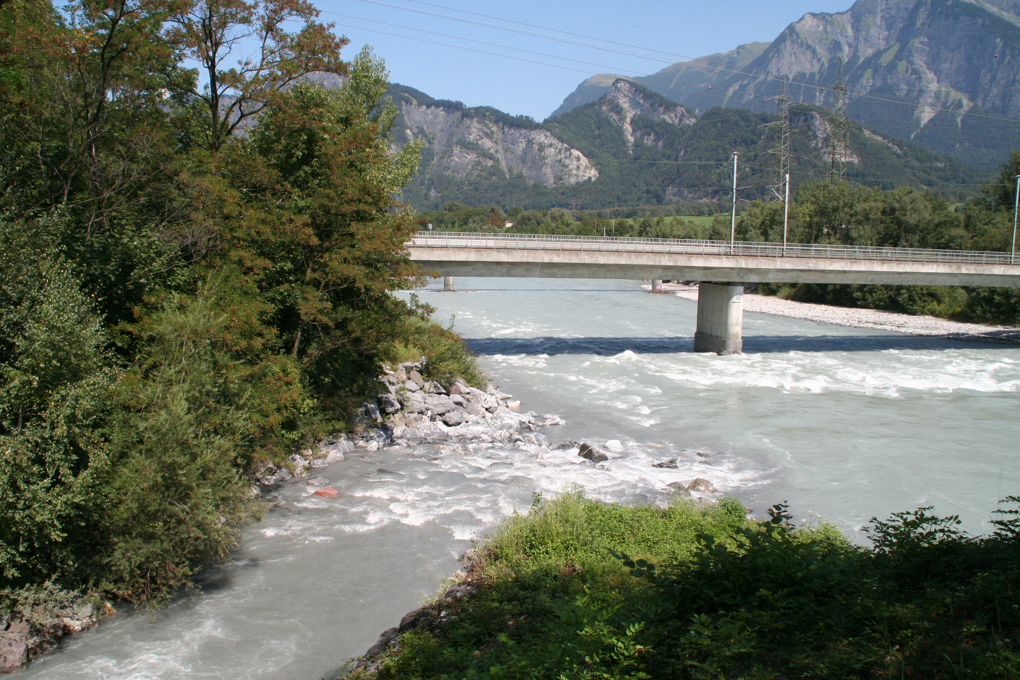 Mündung der Tamina in den Rhein bei Bad Ragaz